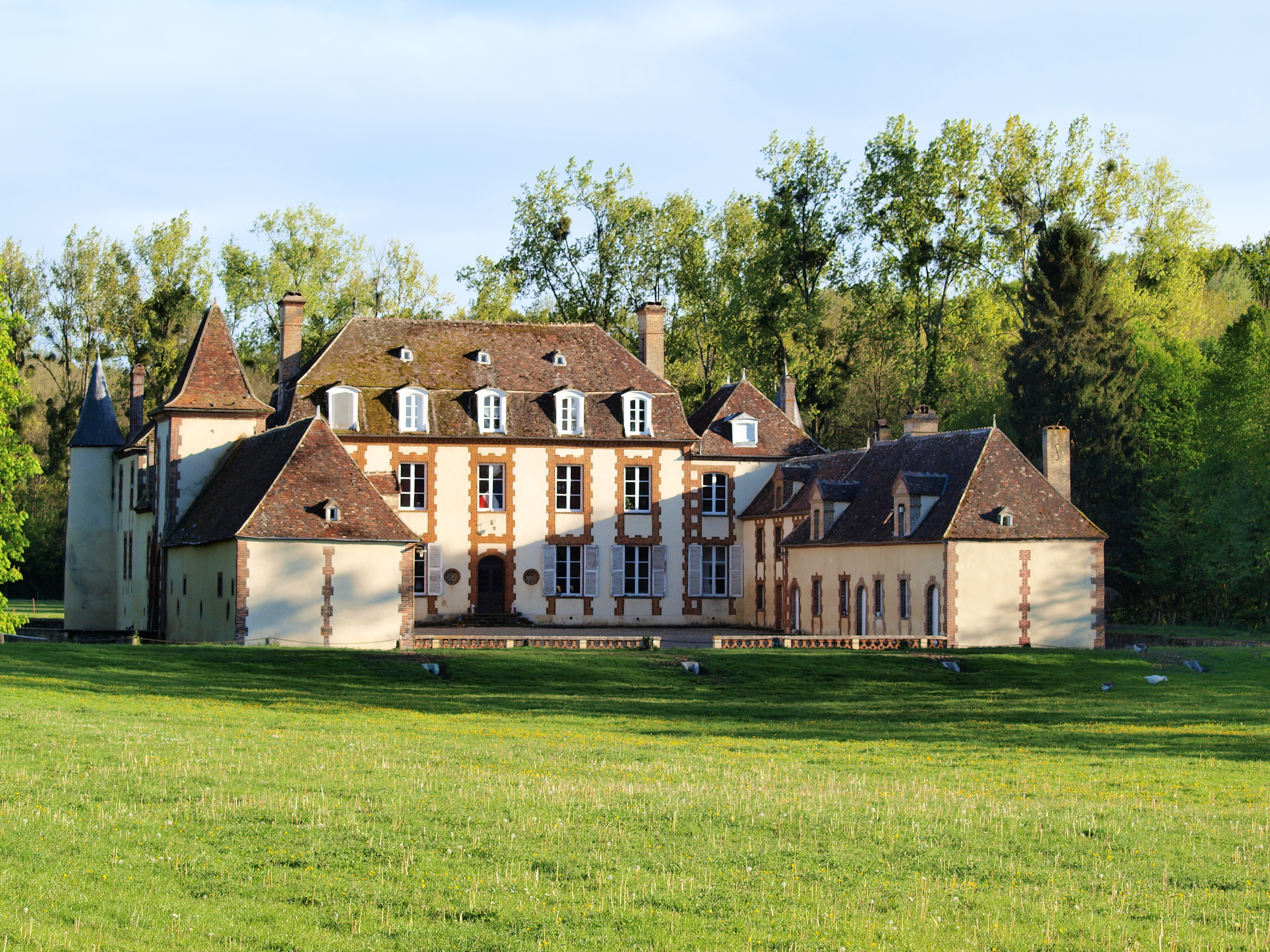 Château de Fourolles (Saint-Aubin-Château-Neuf, Yonne, France)